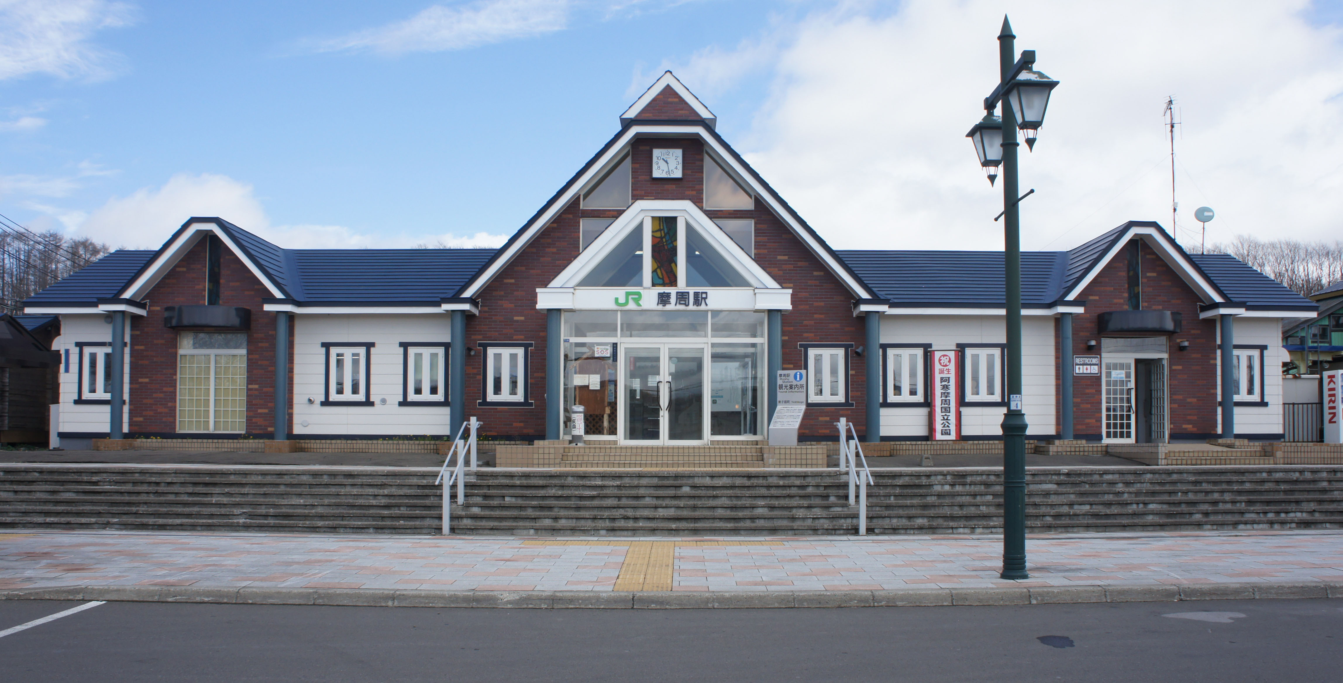 JR釧網本線・摩周駅の駅舎